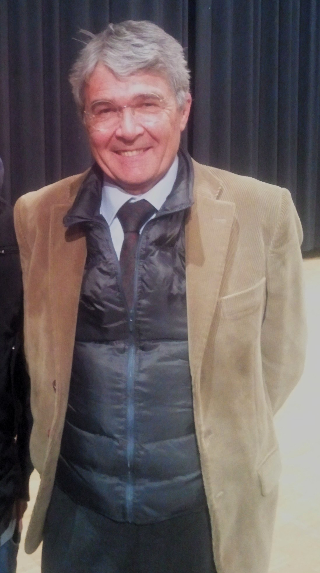 Il senatore uscente della Lega Nord Roberto Castelli al dibattito sulla macroregione del nord tenuto a Cisano Bergamasco nel febbraio 2013.